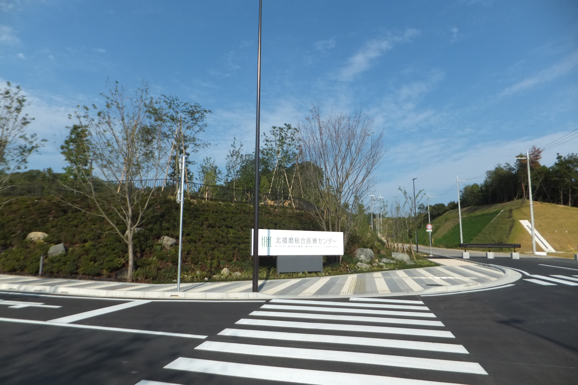 建設中の北播磨総合医療センター（2013年9月22日）